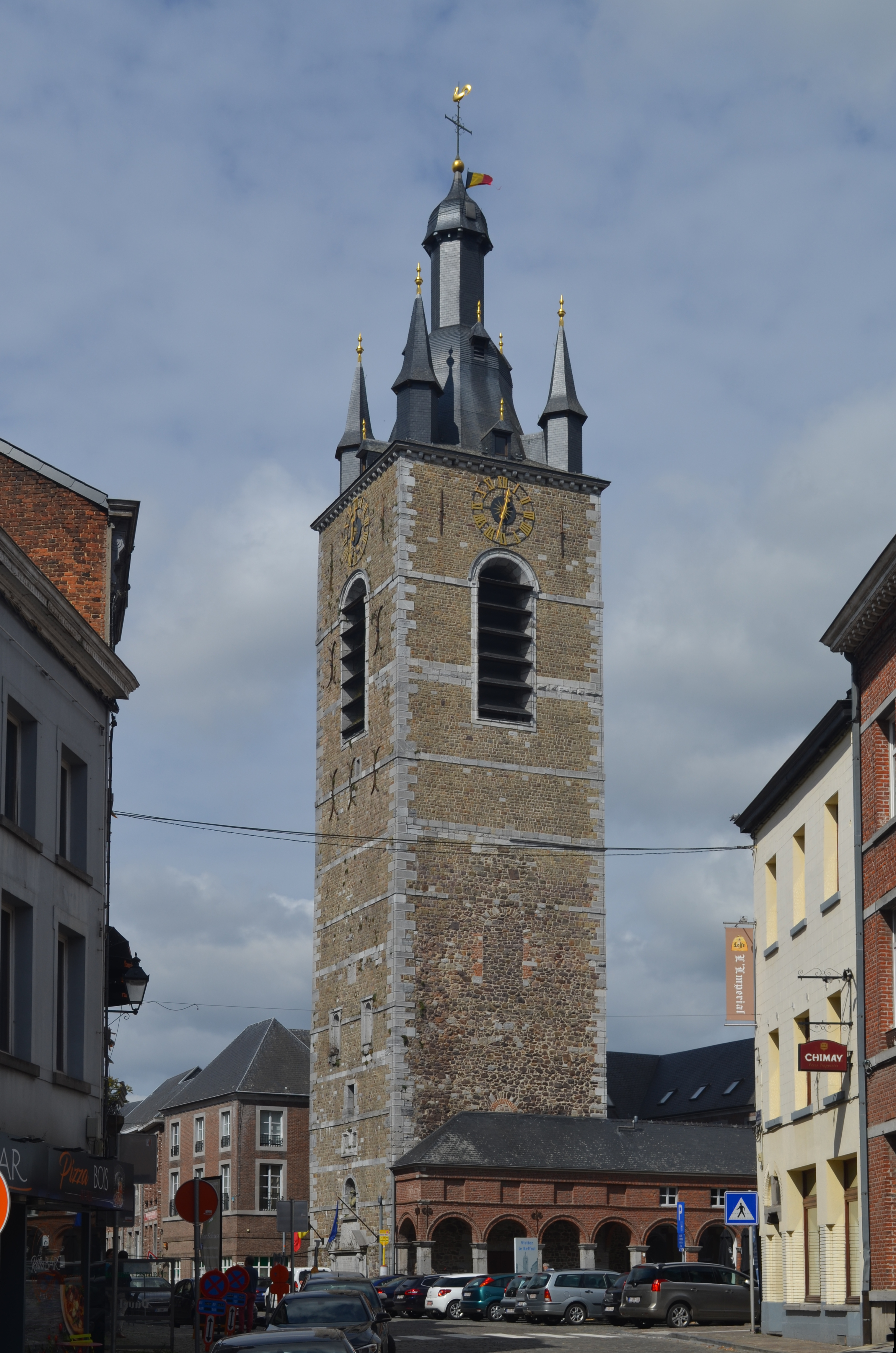 Thuin (Belgique) - Beffroi - Faces est et sud du beffroi vu depuis l'angle de la rue Maurice des Ombiaux et de la Grand Rue. This photo of immovable heritage has been taken in the Walloon Region